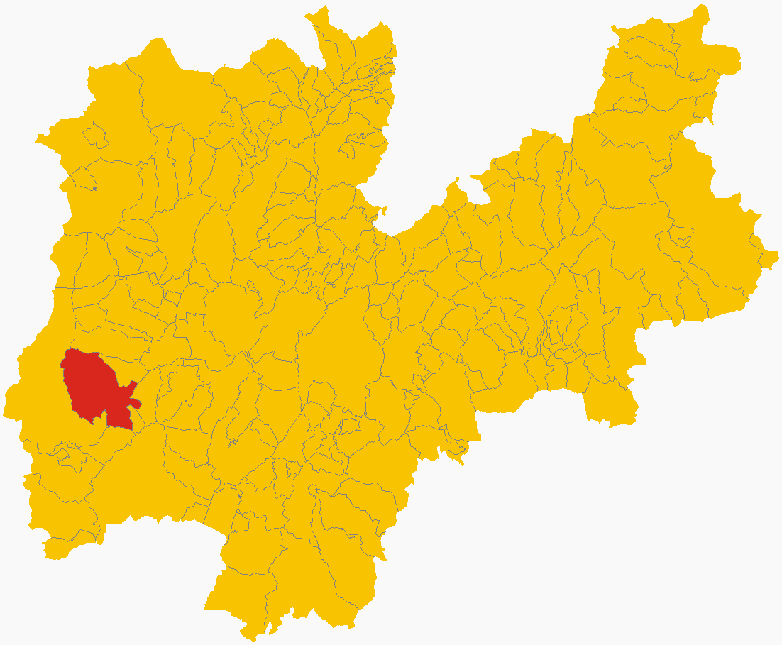 Mappa del comune di Sella Giudicarie nella provincia di Trento, in Italia.